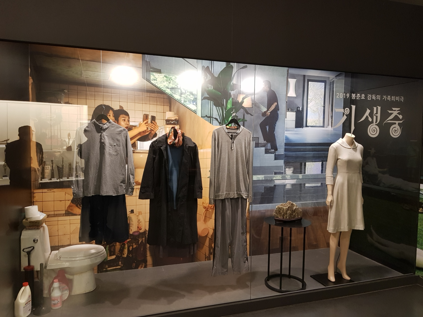 영화 기생충에 사용되었던 소품들 모음